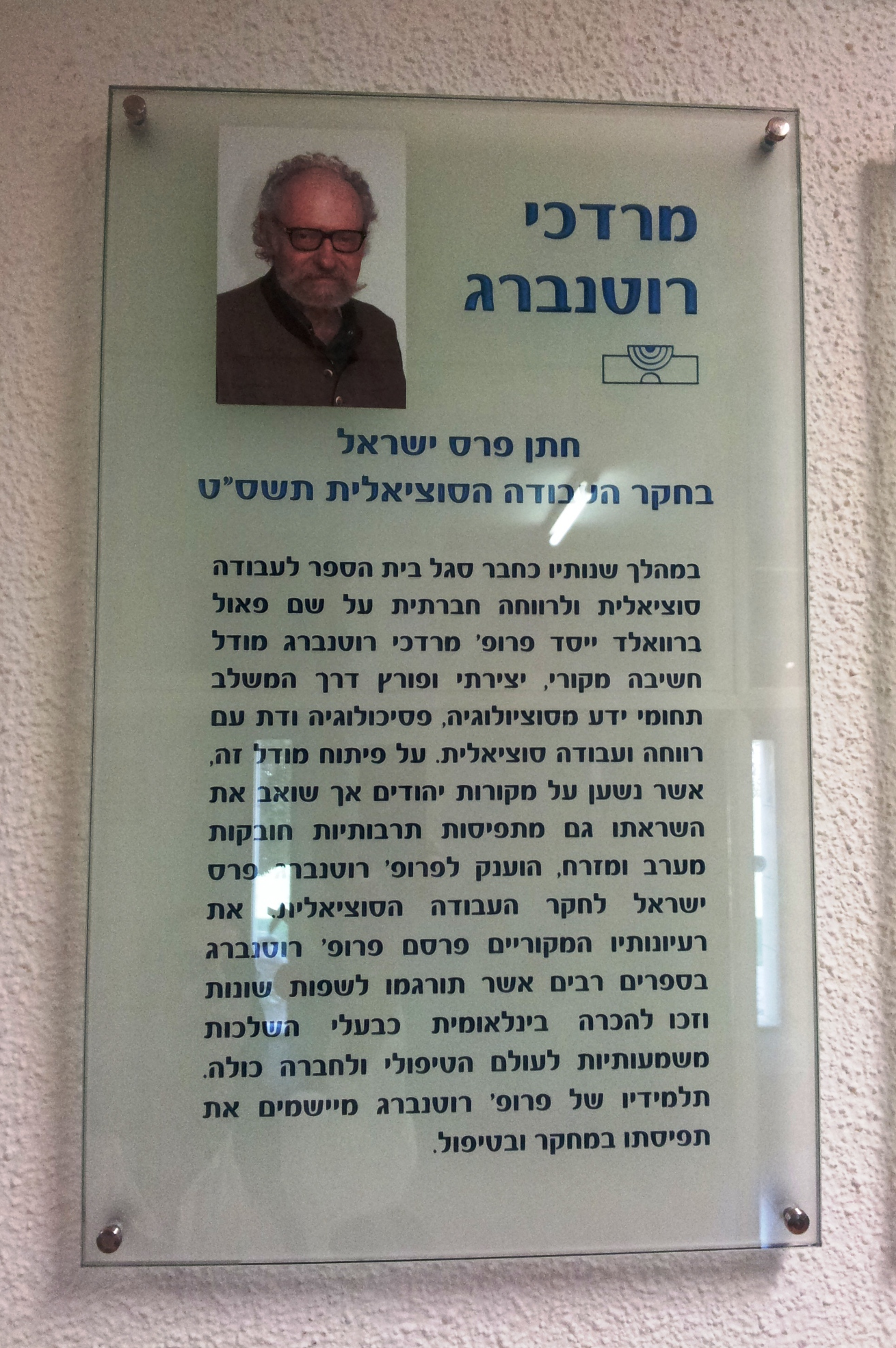 שלט מרדכי רוטנברג בפתח בית הספר לעבודה סוציאלית בקמפוס האוניברסיטה העברית בהר הצופים